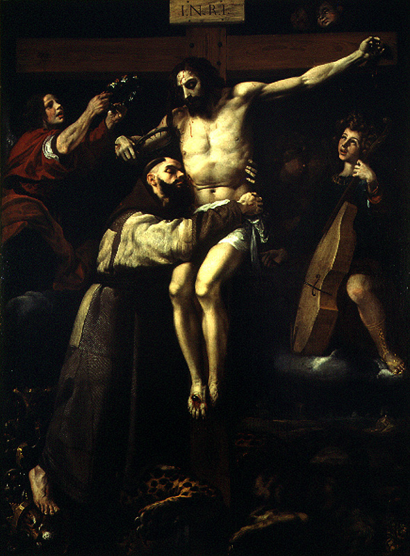 La obra representa a San Francisco de Asís abrazando a Jesús crucificado.